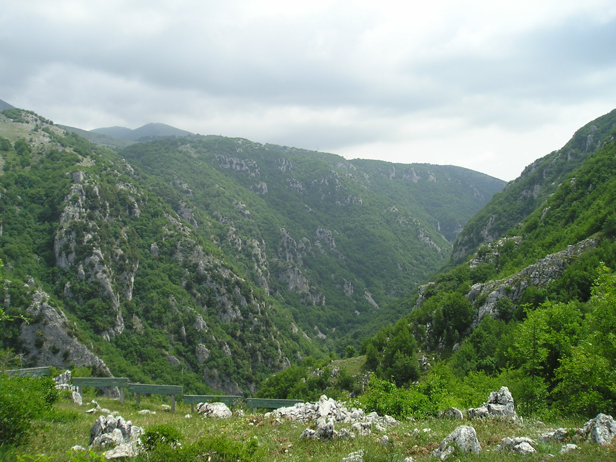 L'autore di quest'immagine è l'utente Gand, che la lascia nel pubblico dominio.